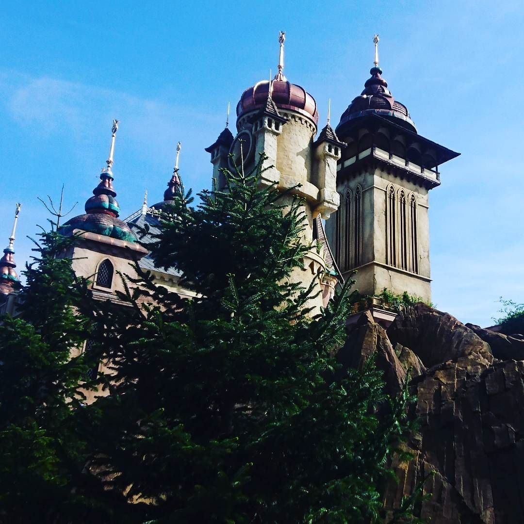 Exterieur van darkride Symbolica in de Efteling gezien vanuit de wachtrij.